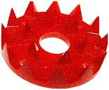 кружок